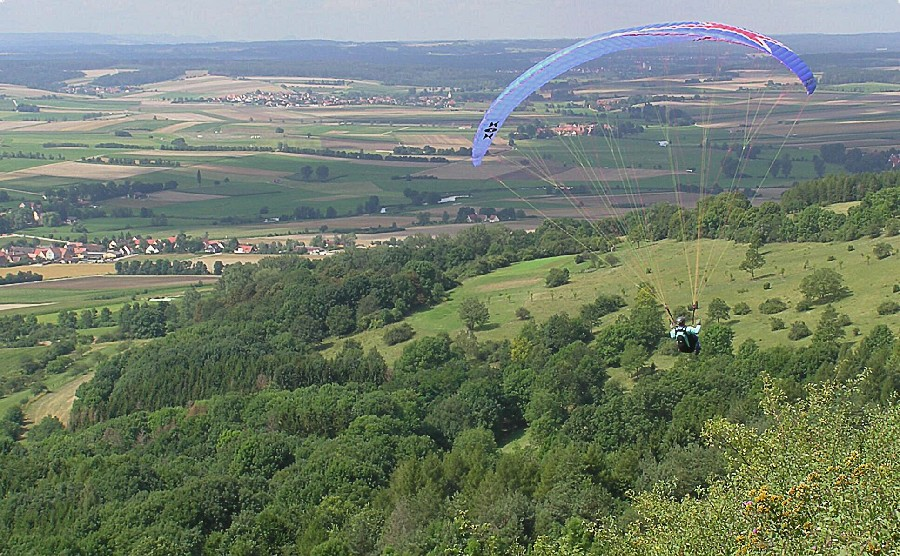 Gleitschirmflieger am Hesselberg